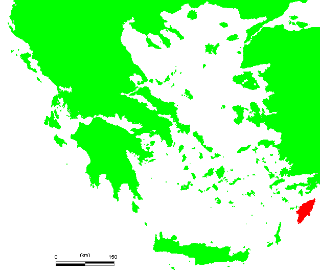 GR Rhodes.PNG (Greek island)